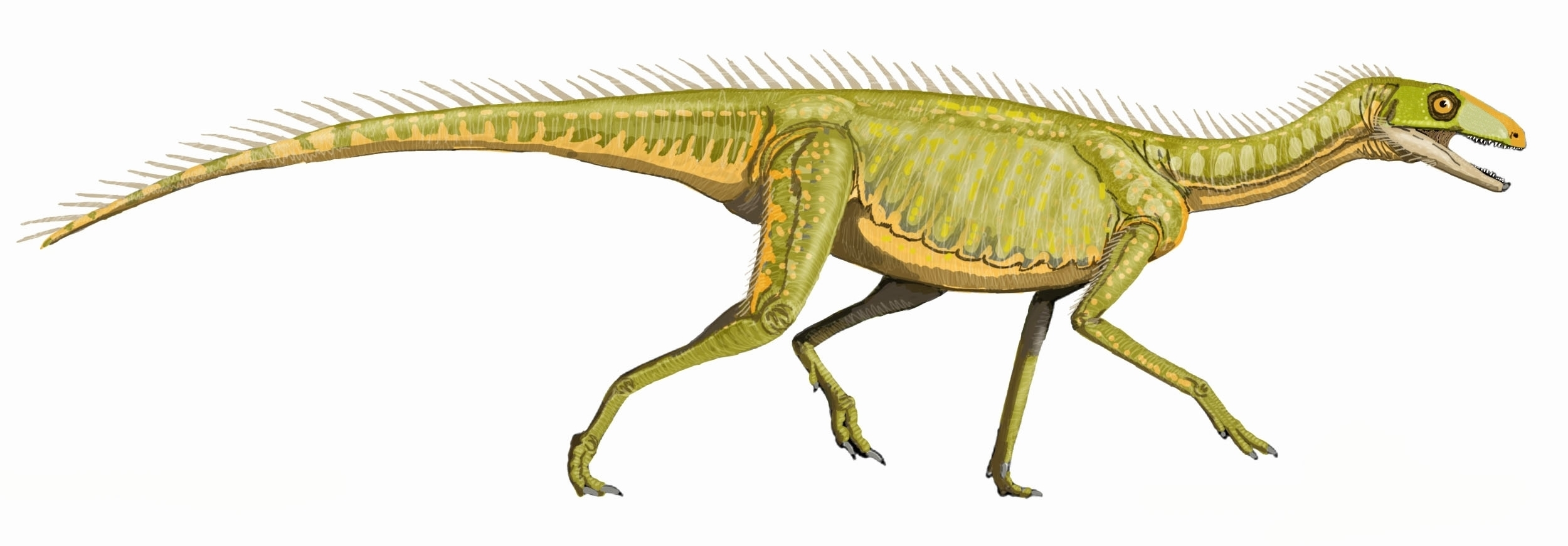 Silesaurus oploensis